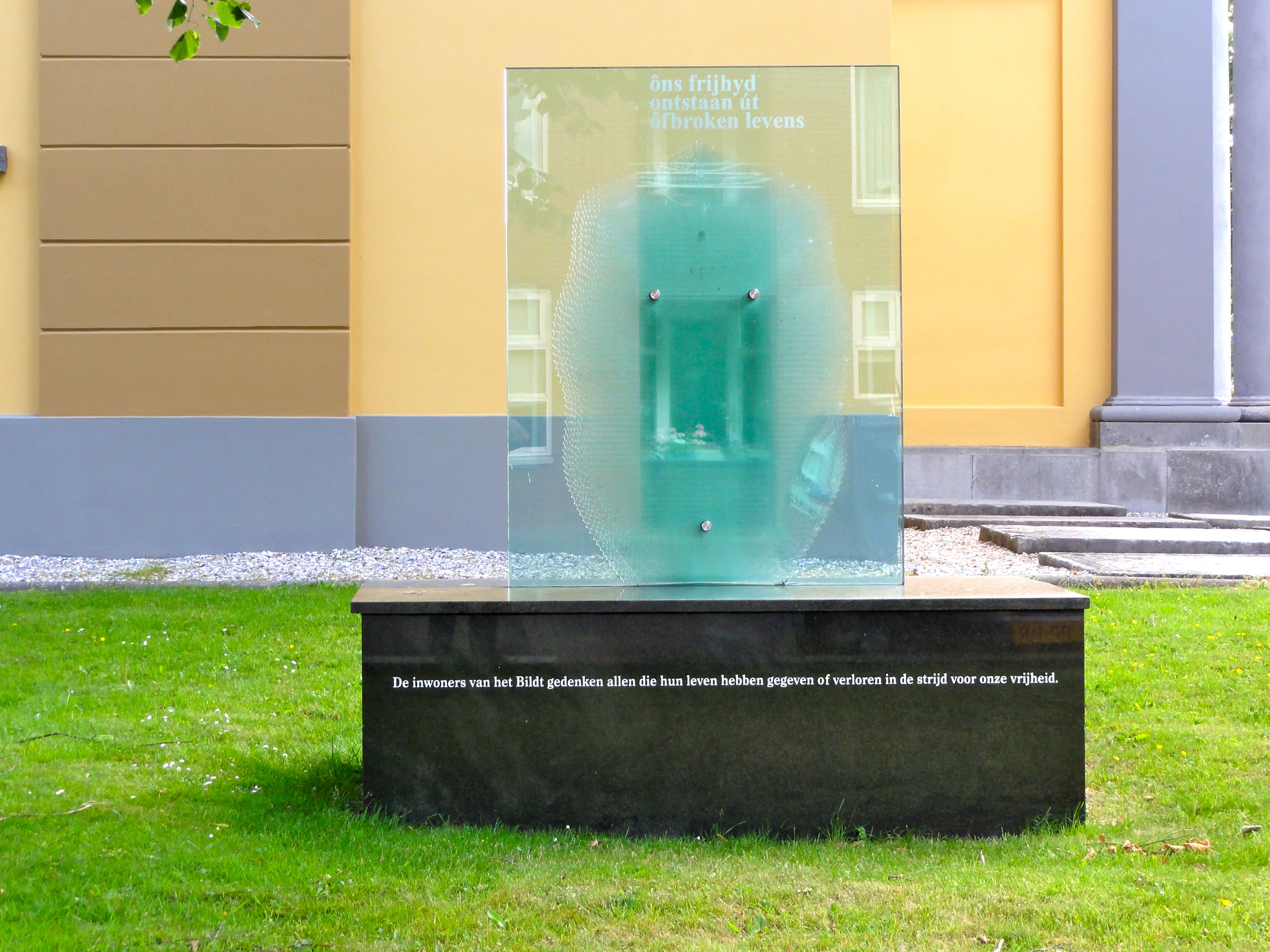 Verzetsmonument "Ôns frijheid ontstaan út ôfbroken levens" door Verena (Vreni) Wagner op het terrein van de Groate Kerk in Sint-Jacobiparochie